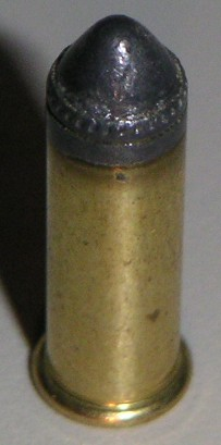 Taken May 31, 2006.